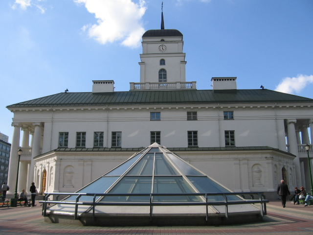 минская ратуша